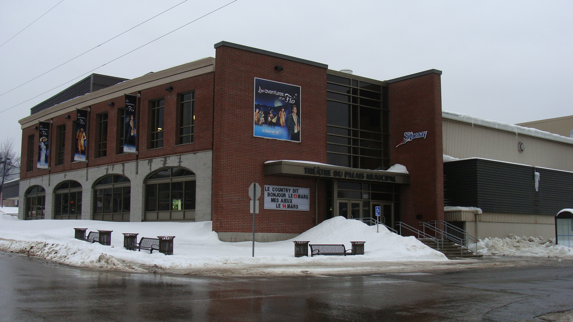 Théâtre du Palais municipal, à La Baie, au Saguenay (Québec, Canada). Vue de biais.